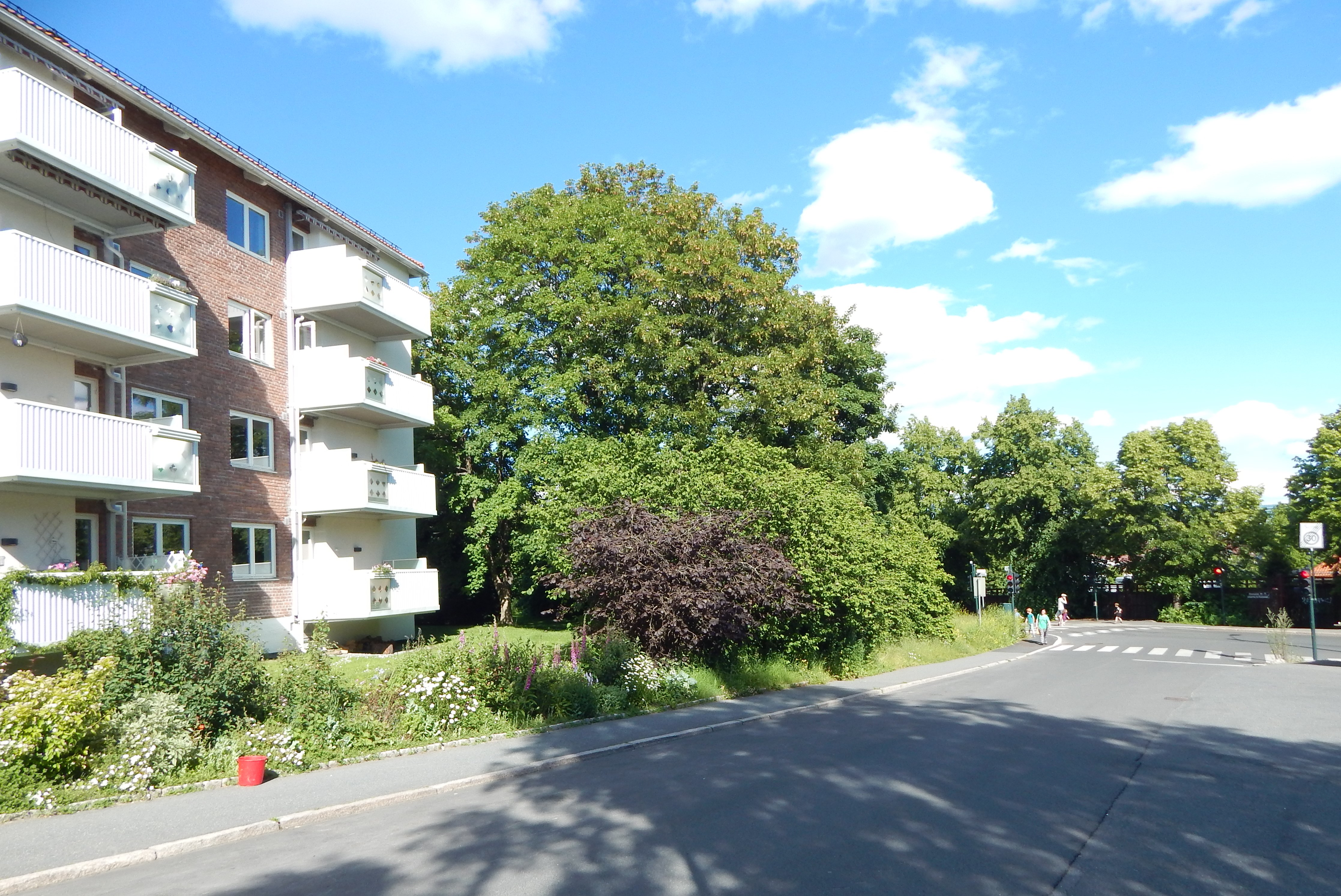 Ålovs vei